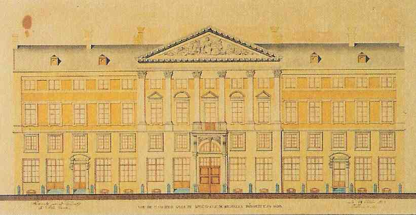 Théatre de la Monnaie Brussels. The old brussels monnaie opera house.